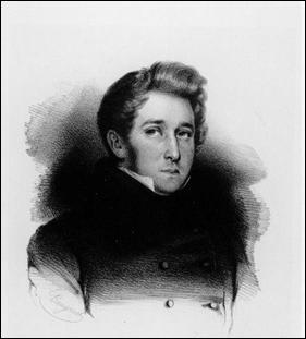 Adolphe Dechamps, ministre belge